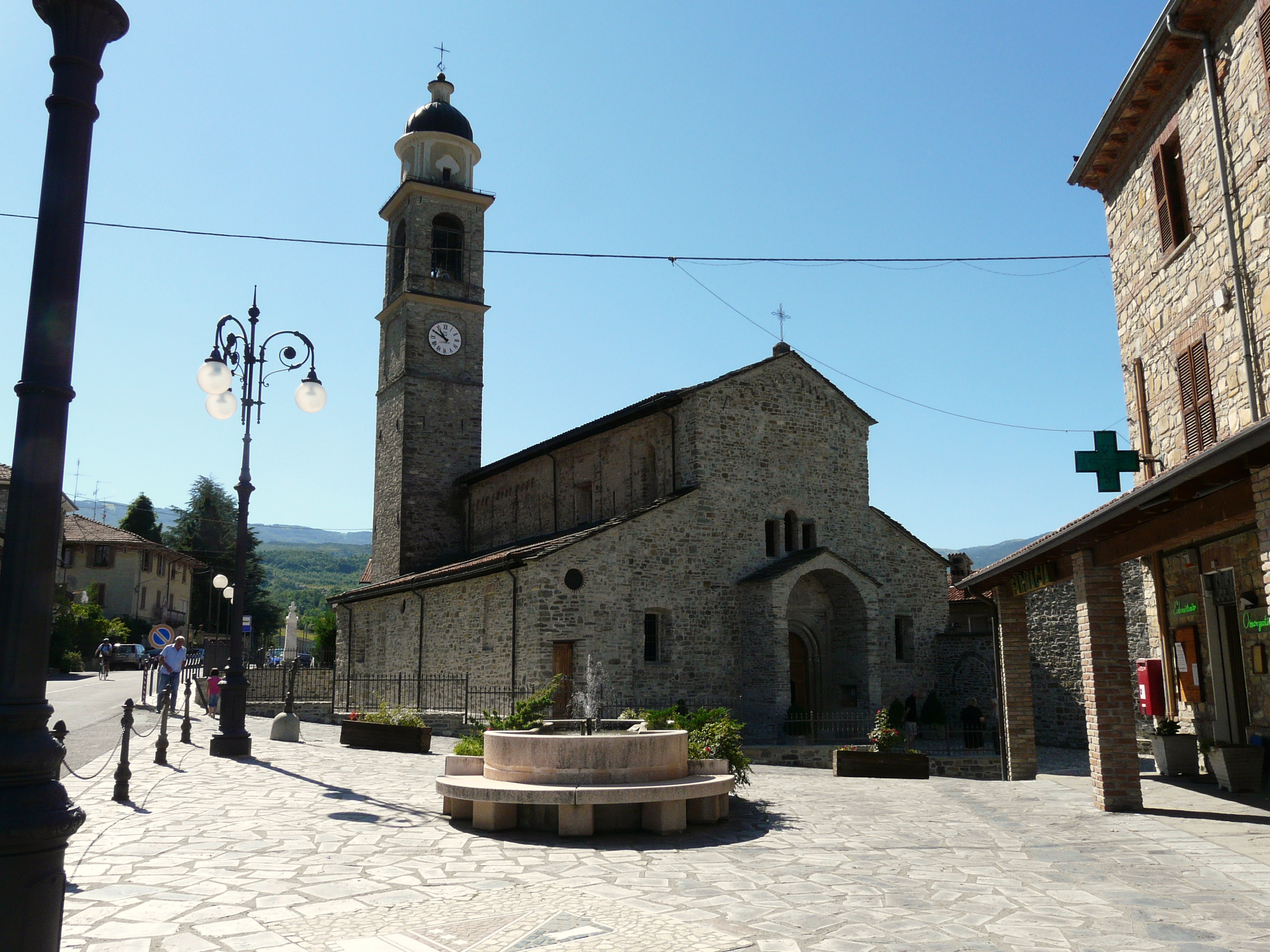 Pieve di Santa Maria Assunta di Fabbrica Curone, Piemonte, Italia